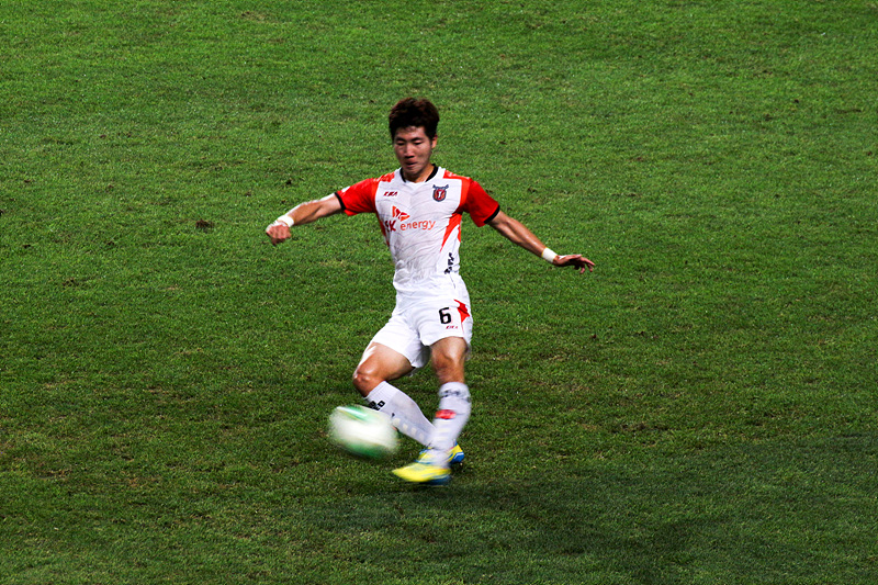 7월 31일 K리그 클래식 FC서울 vs 제주